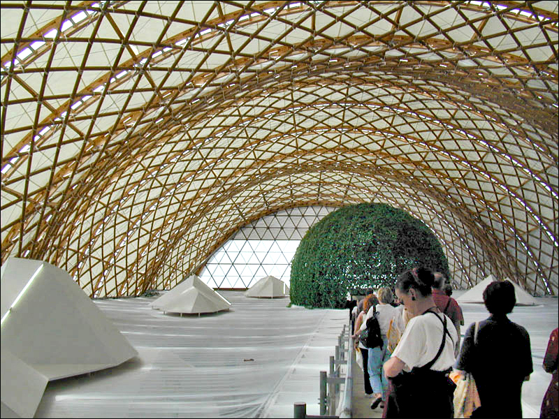 Sur la photo, on observe la structure du pavillon en tubes de papier recouverte d'un voile composite, lui-même en tissu et papier, laissant passer la lumière. Le pavillon du Japon de l'Exposition Universelle de Hanovre en 2000 a été conçu par Shigeru Ban, un des deux architectes du Centre Pompidou Metz. Long de 72 mètres et comprenant deux étages, le pavillon était composé à 80 % de papier recyclé et recyclable. Il symbolisait le cycle de production, de destruction et de recyclage. Le papier était conditionné en tubes de 12 cm de diamètre, de 20 m de long et d'un poids unitaire de 100 Kg. Shigeru Ban, spécialiste des constructions en matériaux durables, a reçu plusieurs prix pour cette construction qui est parvenue à associer des matériaux naturels et recyclables et des techniques traditionnelles asiatiques.